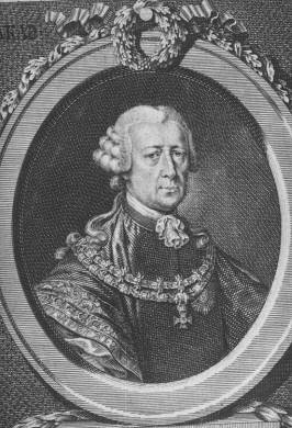 Rudolf Josef Colloredo-Waldsee (1706-1788), člen rodu Colloredů z Waldsee